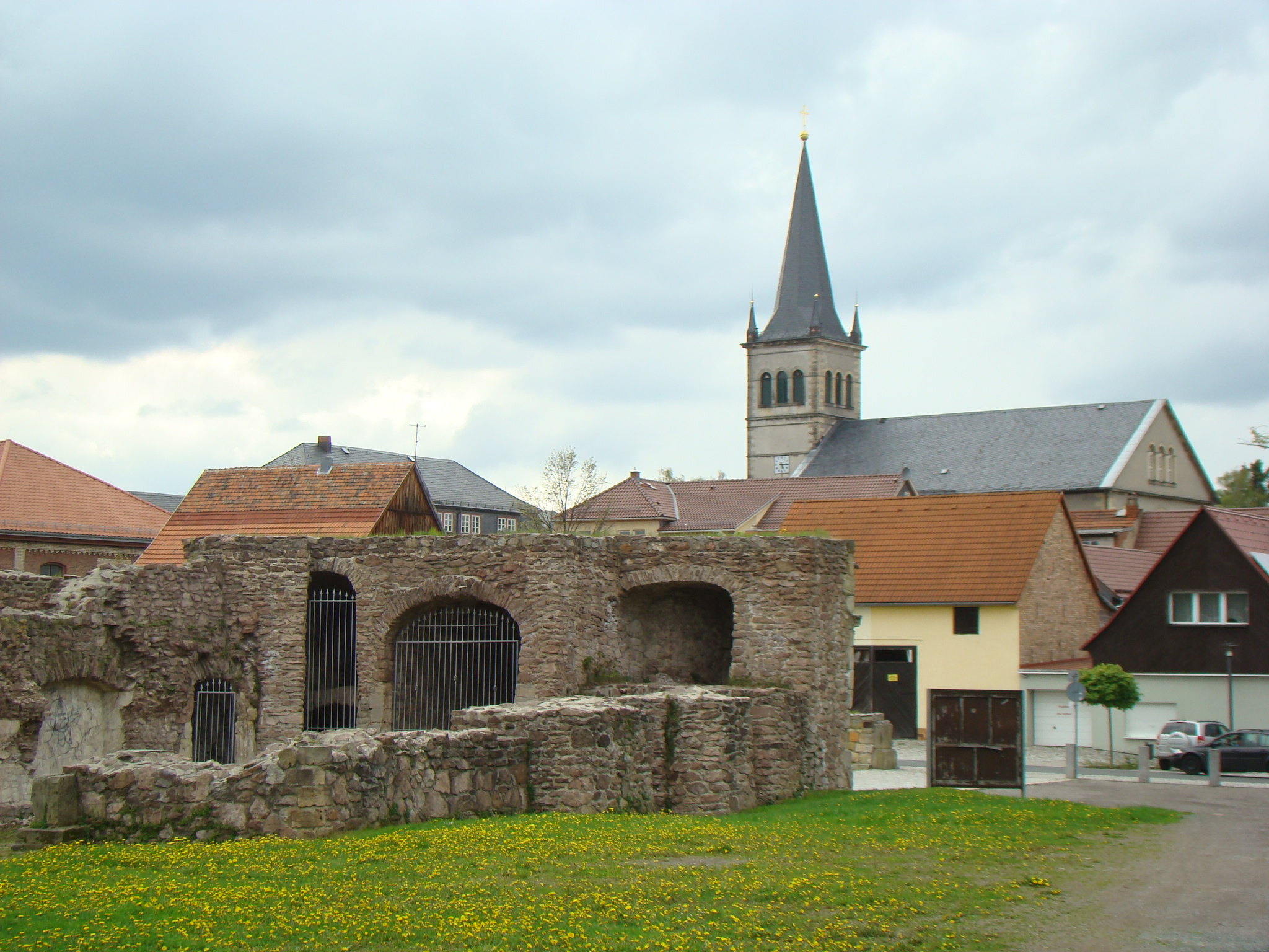 Schlossruine Gehren